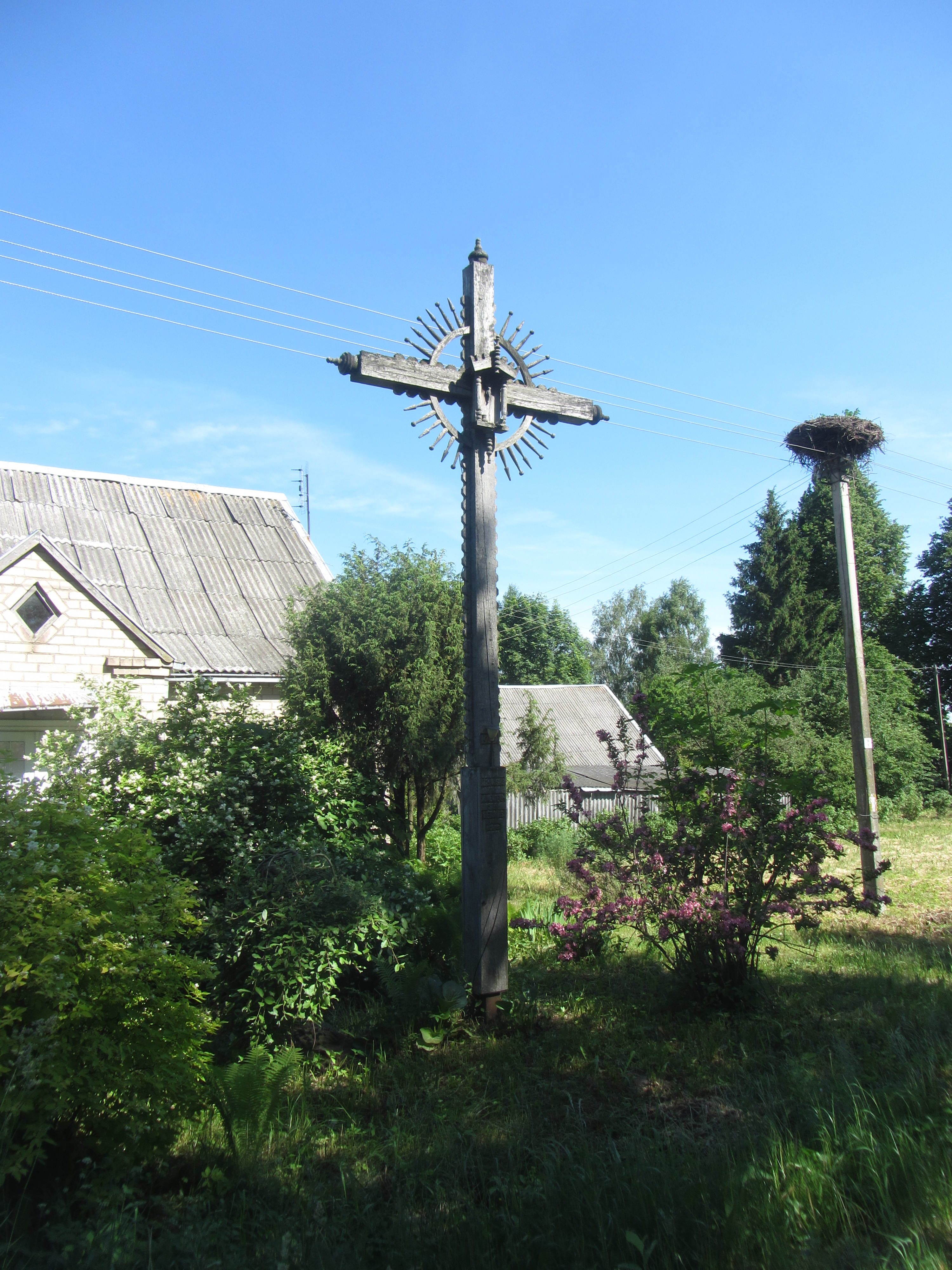 Kibučiai 56265, Lithuania